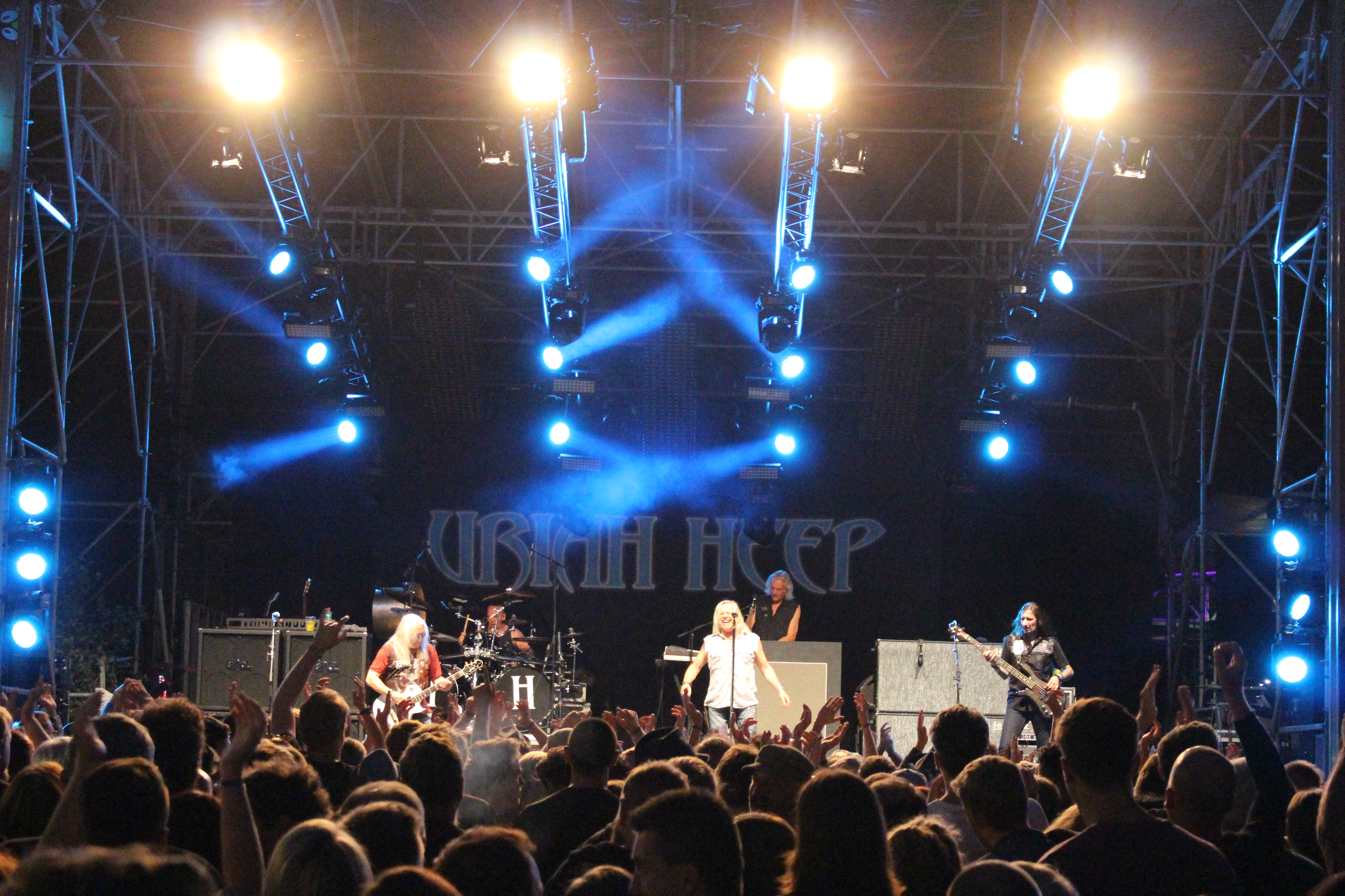 Festivalsommer This photo was created with the support of donations to Wikimedia Deutschland in the context of the CPB project "Festival Summer".